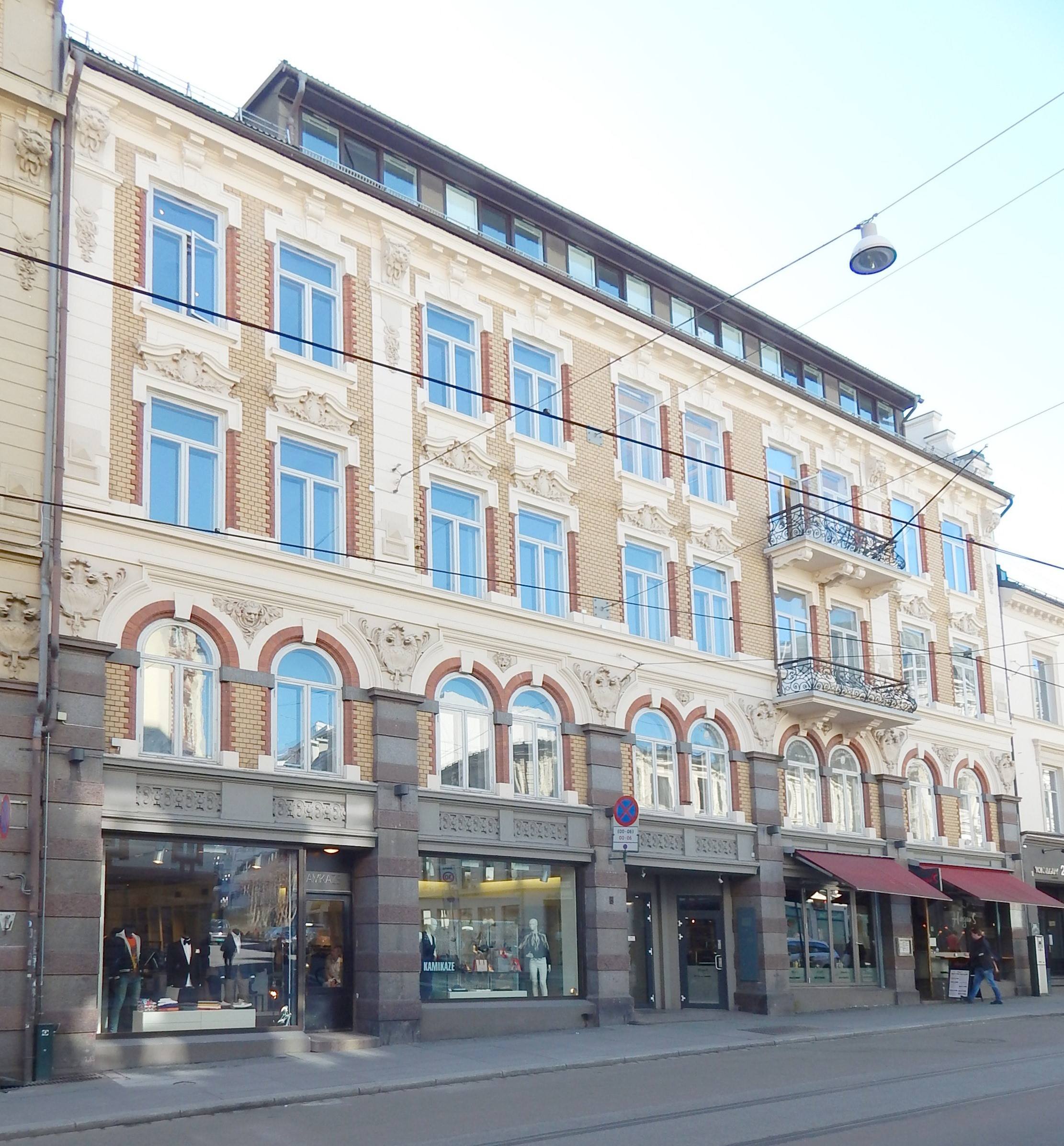 Hegdehaugsveien 24. Arkitekt: Julious Foseid (1898).